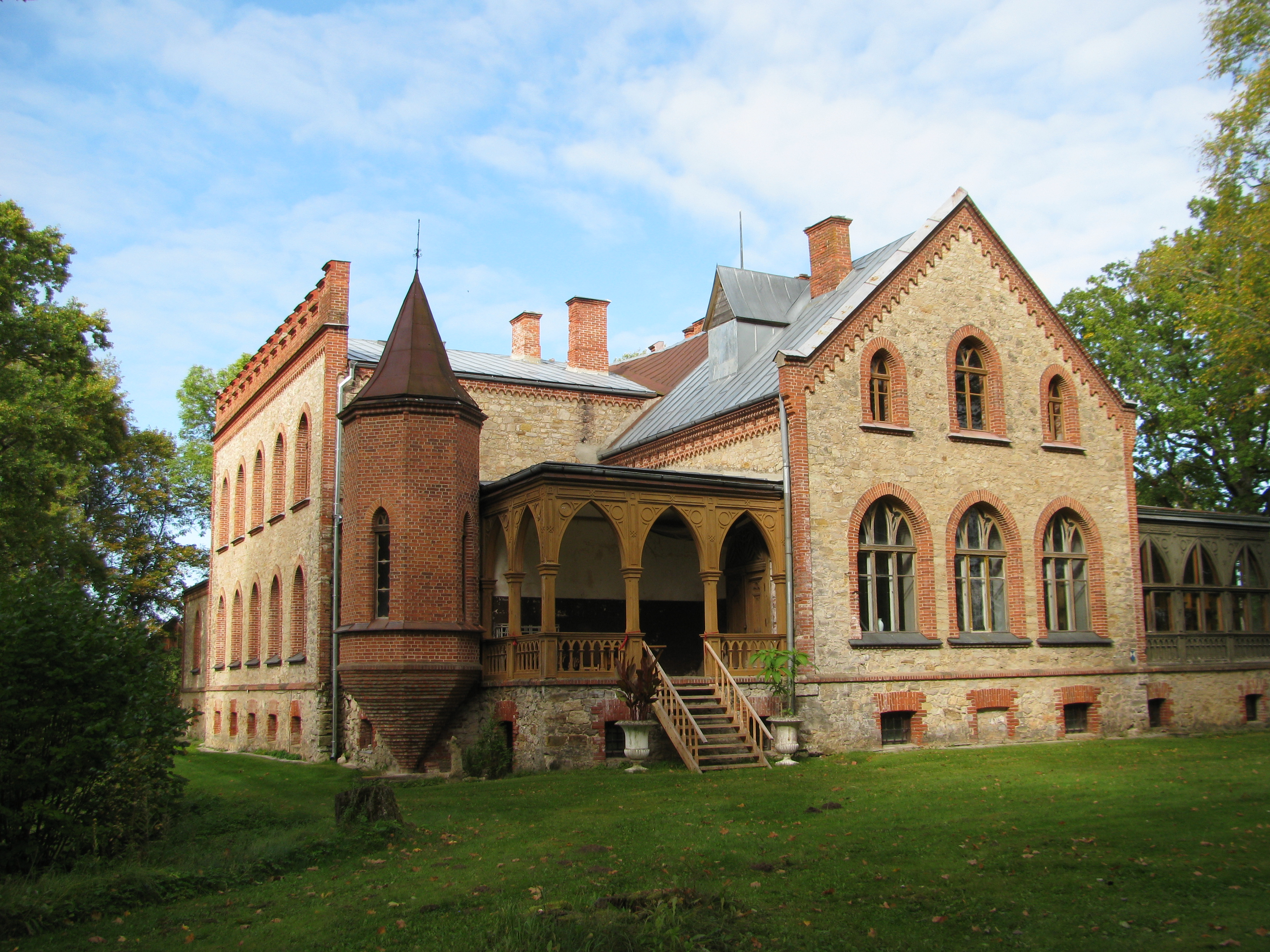 Kungu māja, Gaujienas pagasts